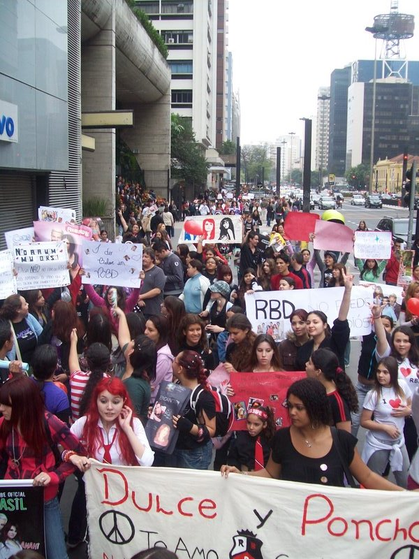 Marcha Mundial contra o fim da banda Rbd em São Paulo, na Avenida Paulista, em 23/08/08. Contou com a presença de mais de 4 mil fãs.